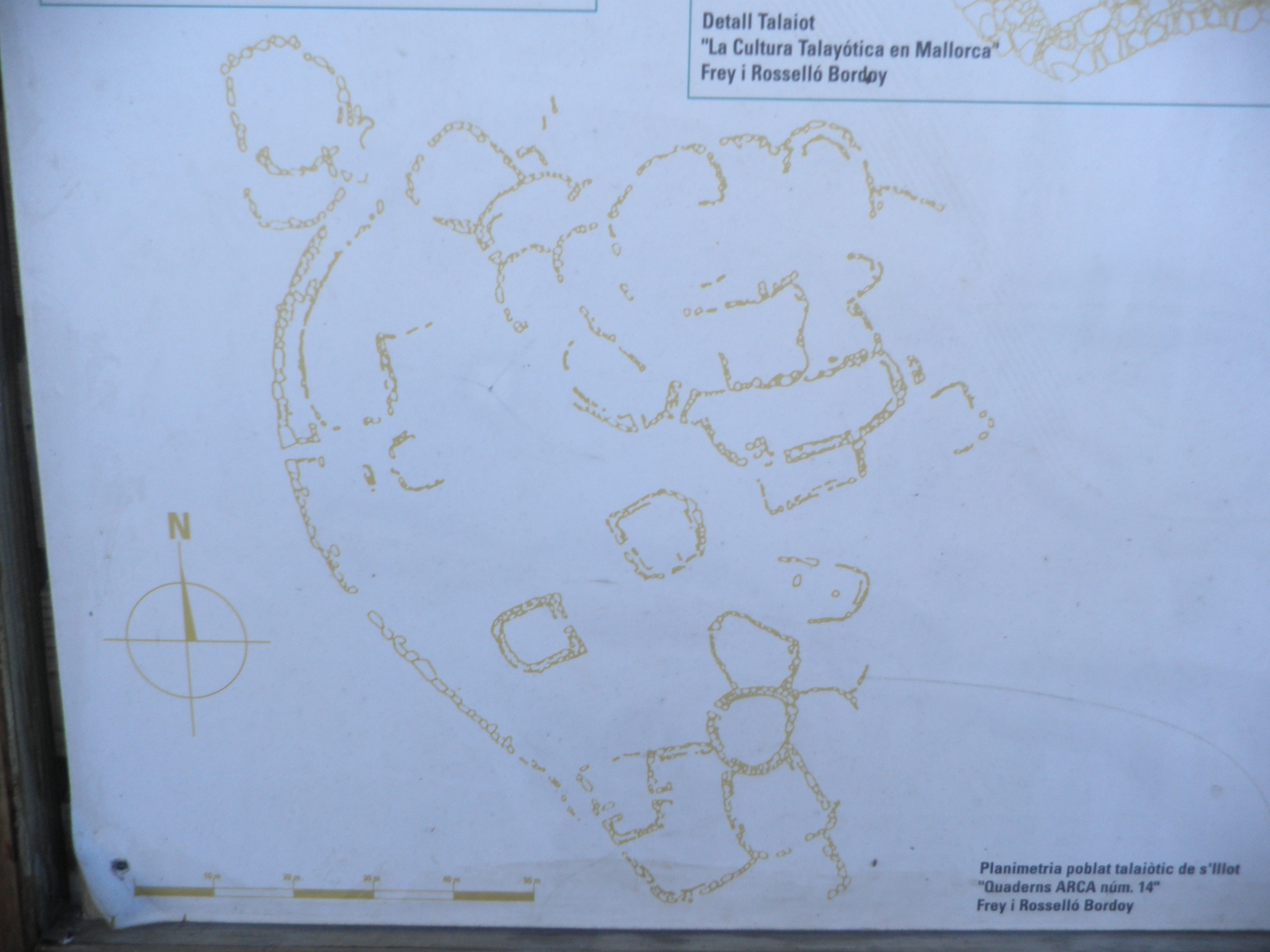 yacimiento talayotico de s´ illot